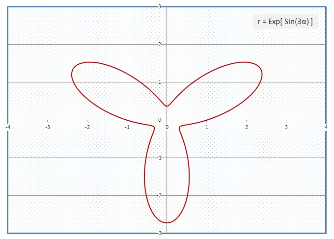 r = Exp[ Sin(3α)